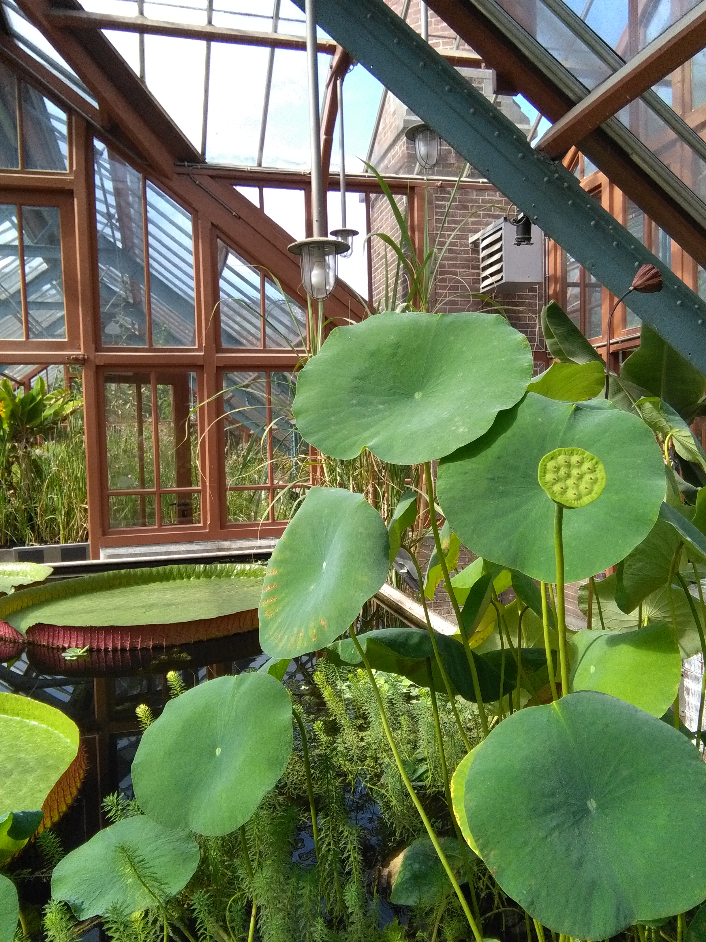 Victoria regia en lotus